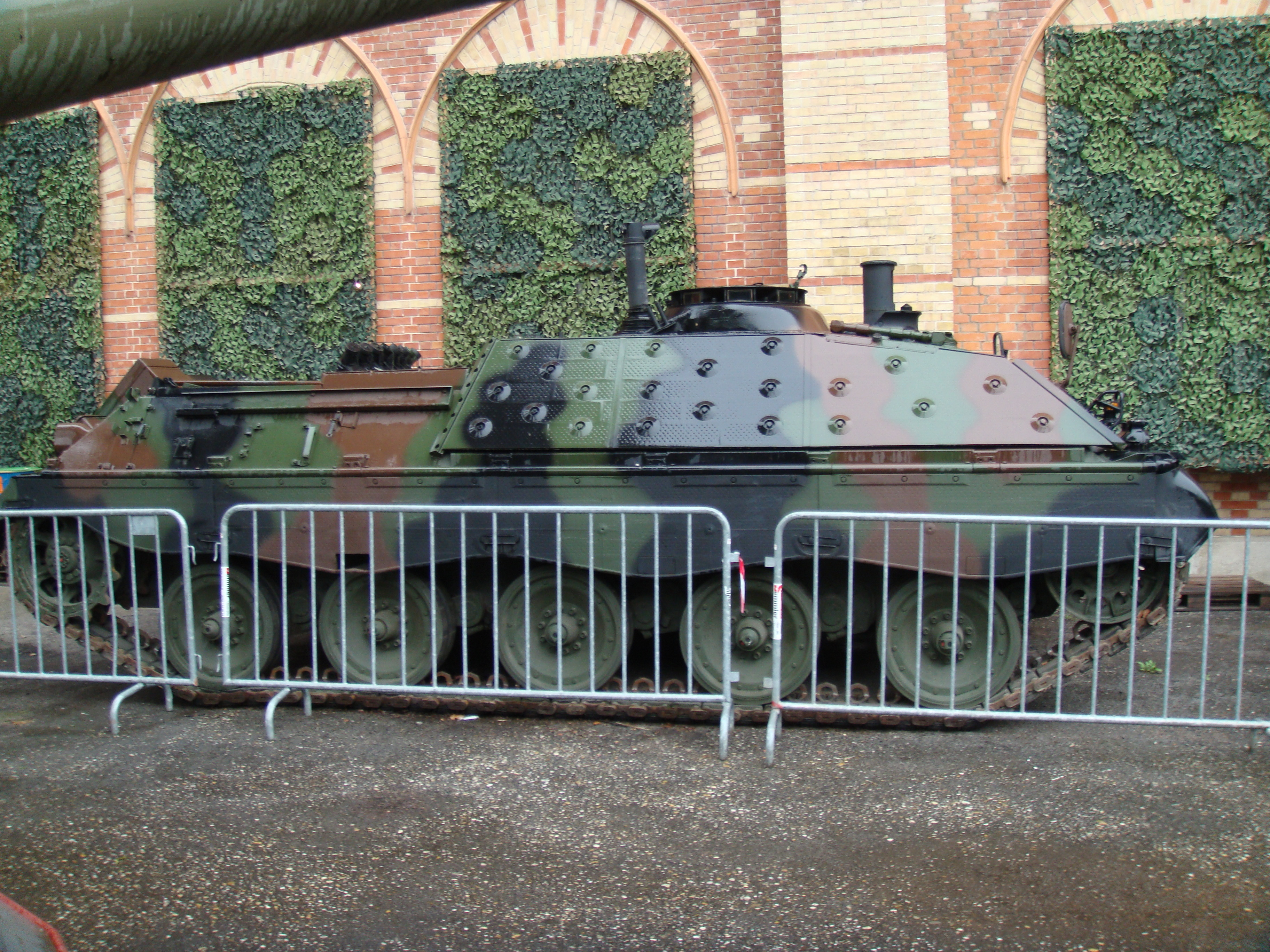 Jagdpanzer Jaguar Heeresgeschichtliches Museum Native nameHeeresgeschichtliches MuseumParent institutionMinistry of DefenceLocationViennaCoordinates48° 11′ 07.3″ N, 16° 23′ 14.6″ E Established1856Web page control : Q700751 VIAF: 149726120 ISNI: 0000 0001 2182 8171 LCCN: n50055593 OSM: 4465113 GND: 2006452-4 WorldCat institution QS:P195,Q700751